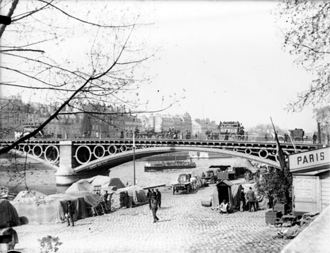 Port du Louvre. Pont des Saints-Pères. Photographié par Eugène Trutat (1840-1910) en avril 1898.